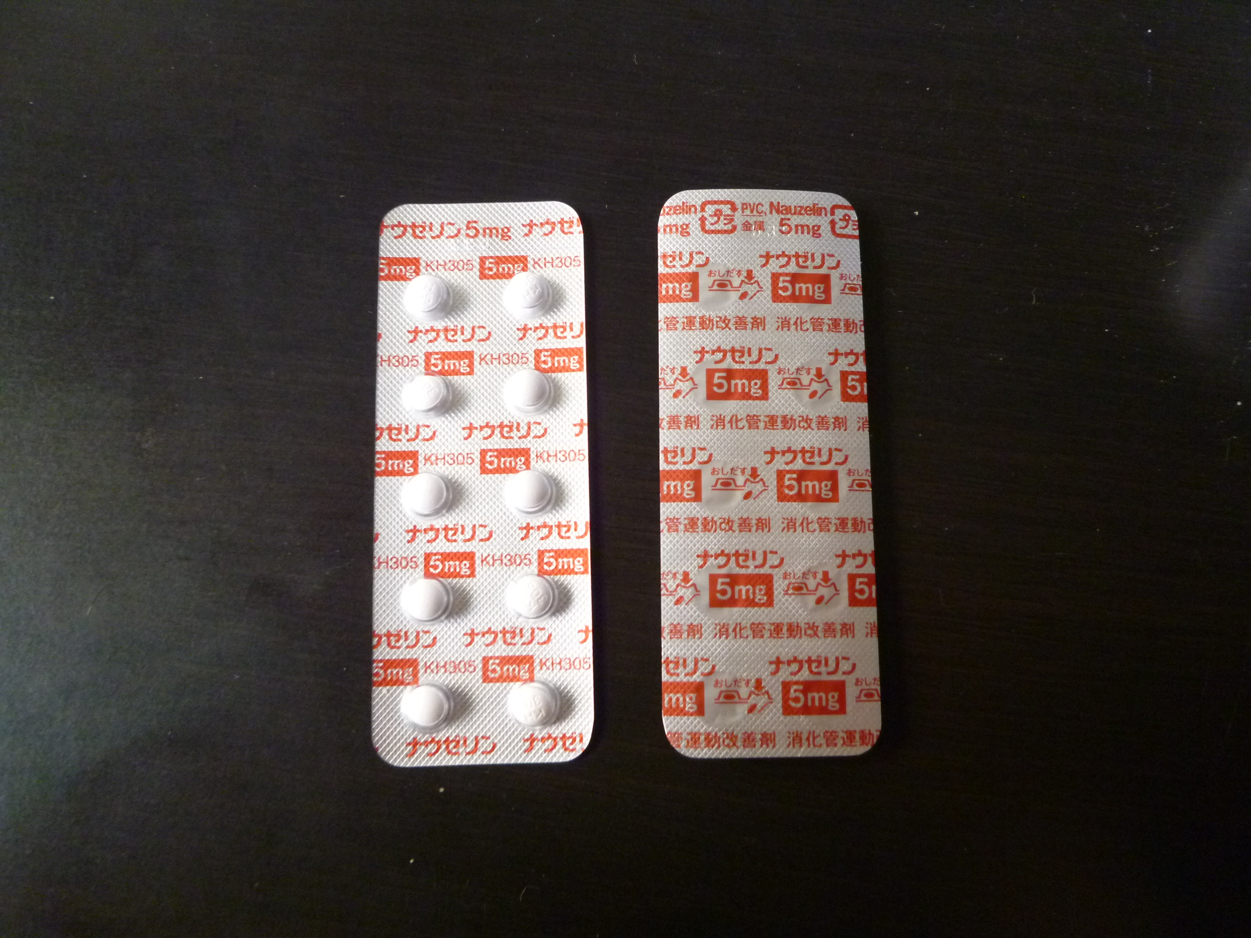 Nauzelin (Domperidone) 5mg Tablets